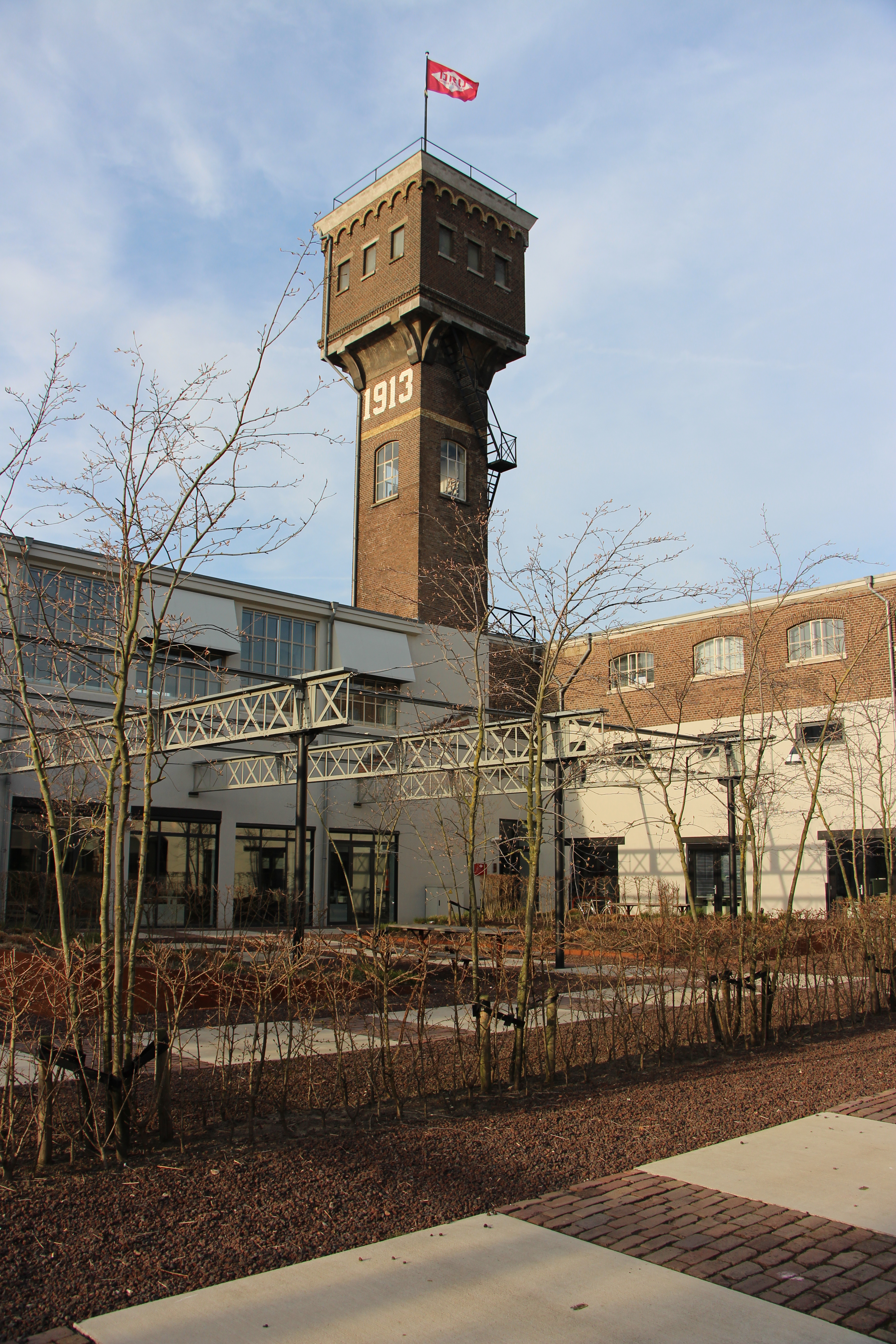 Beltmancomplex, DRU, Ulft.